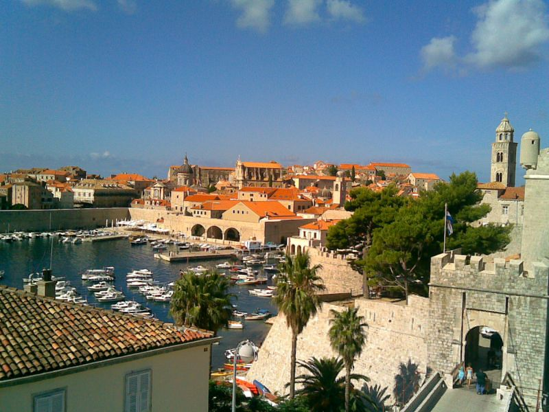 Dubrovnik